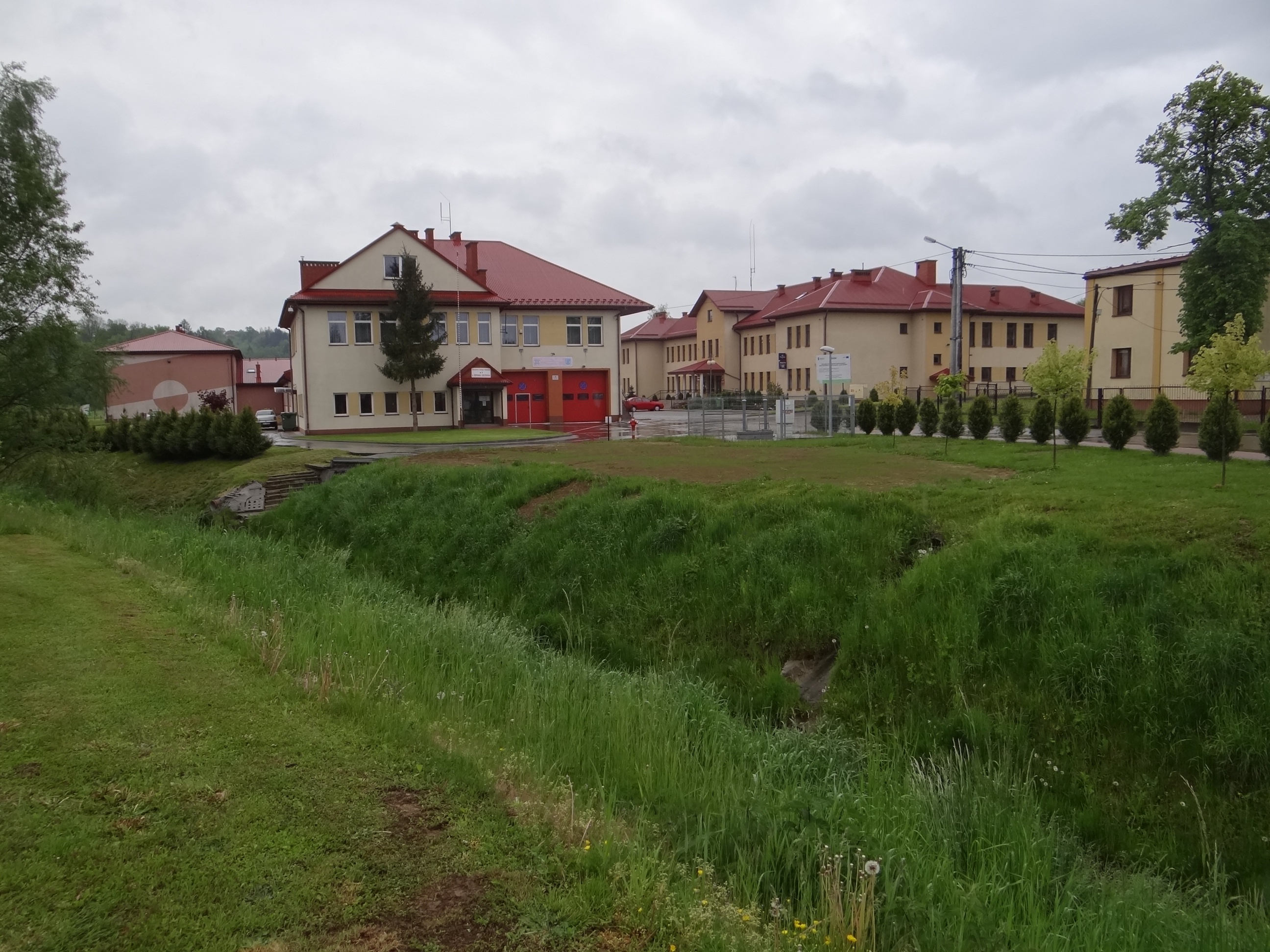 Rzepiennik Strzyżewski. Centrum